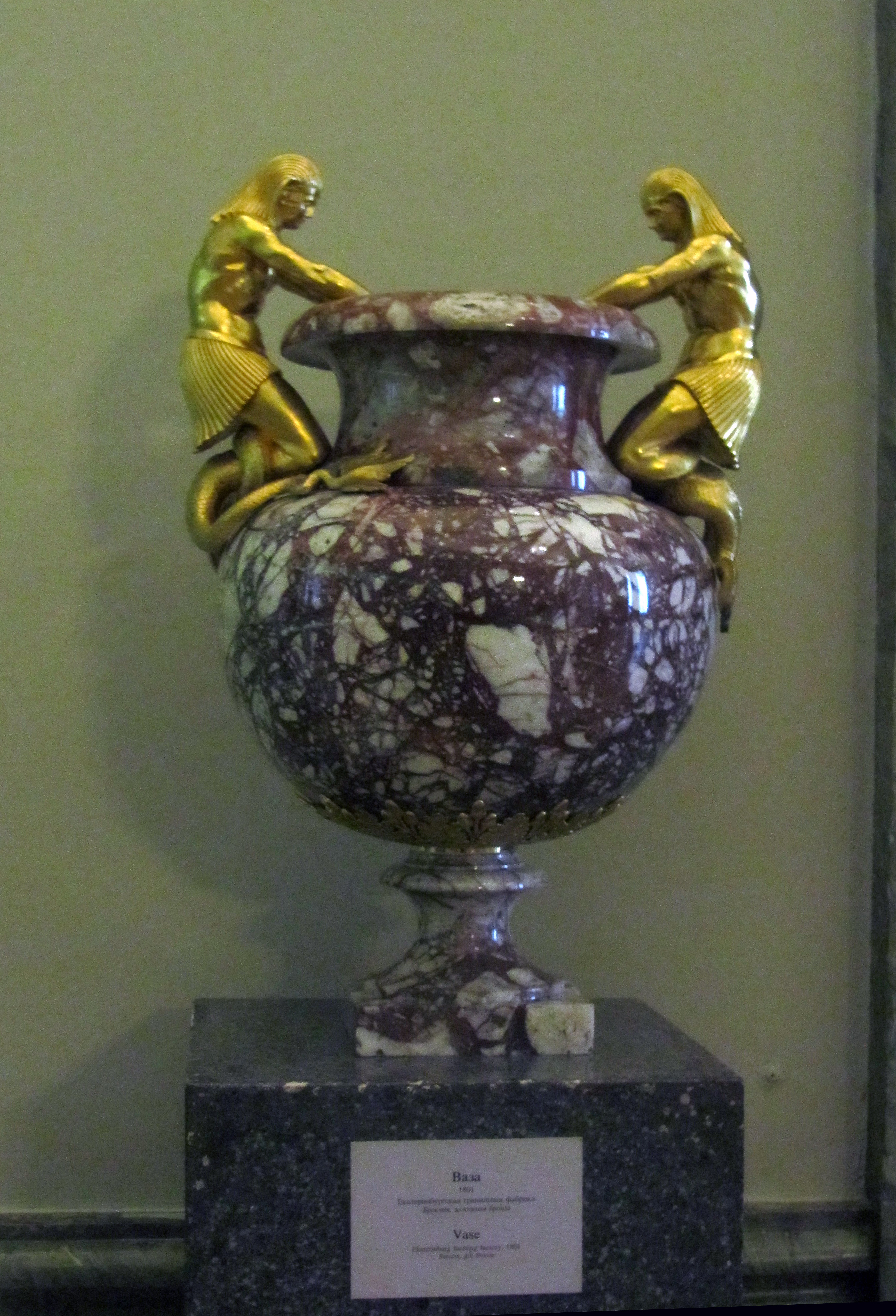 Vaso de 1801 conservado en el museo del Ermitage San Petersburgo